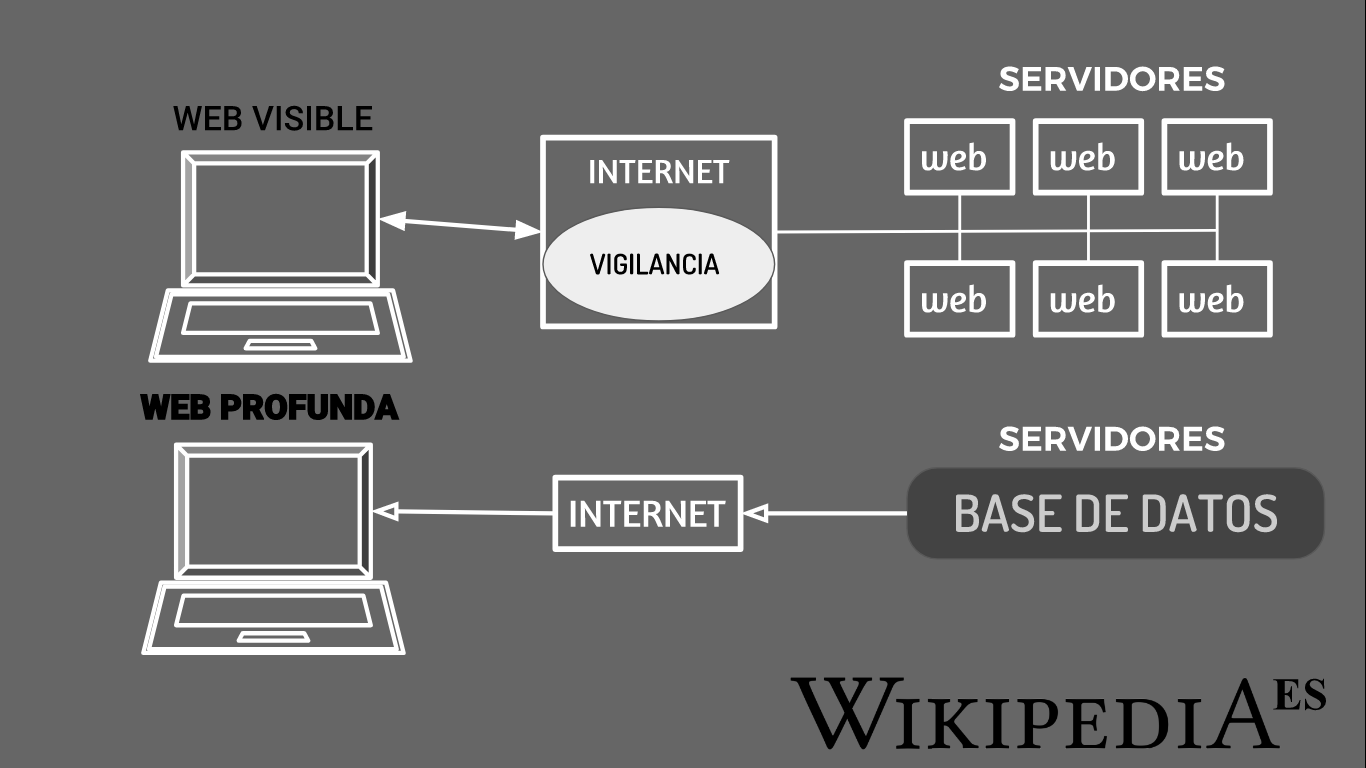 Infografía sobre el uso y la encriptación la deep web